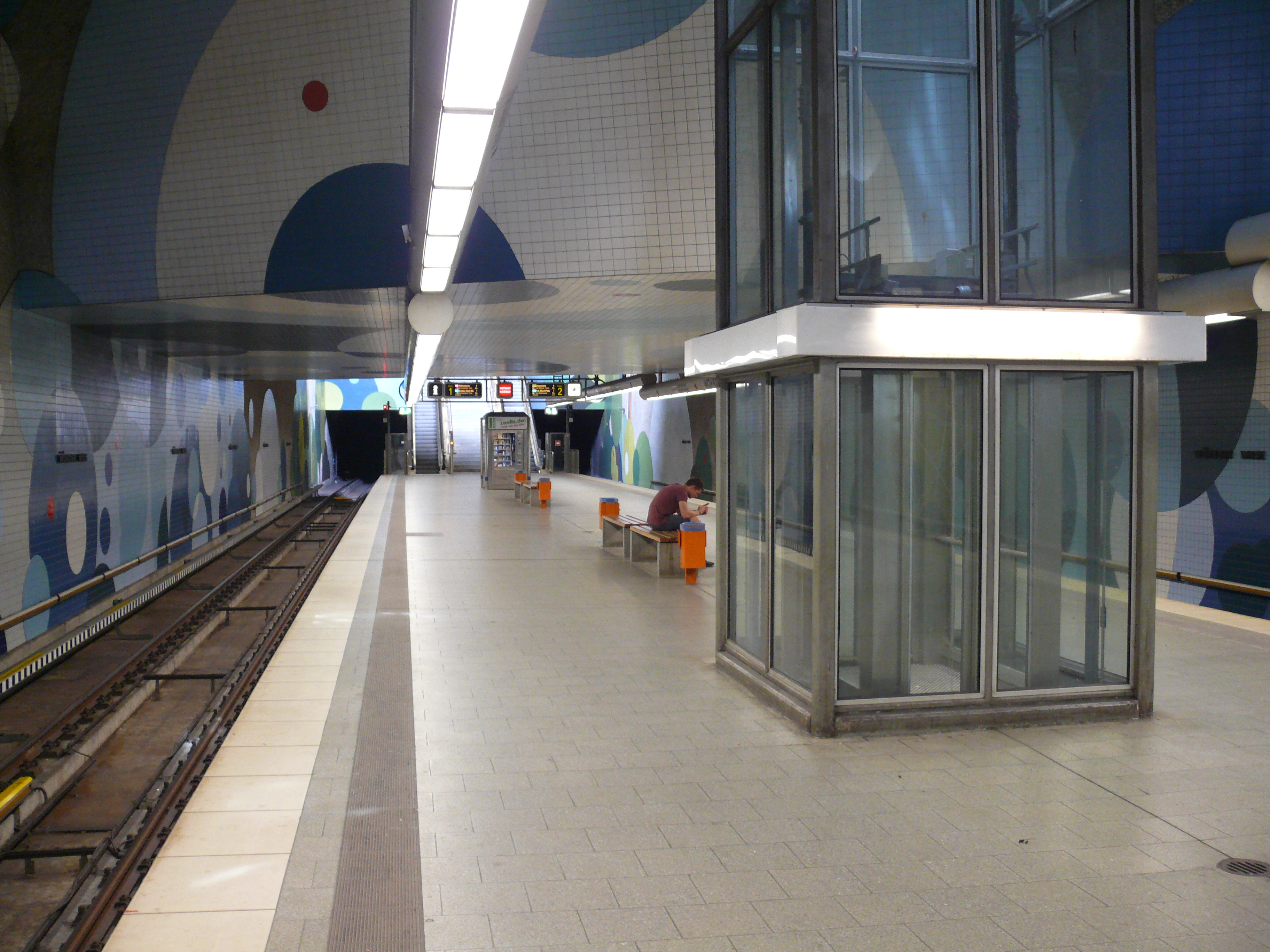 Bahnsteigebene am U-Bahnhof Wöhrder Wiese in Nürnberg.